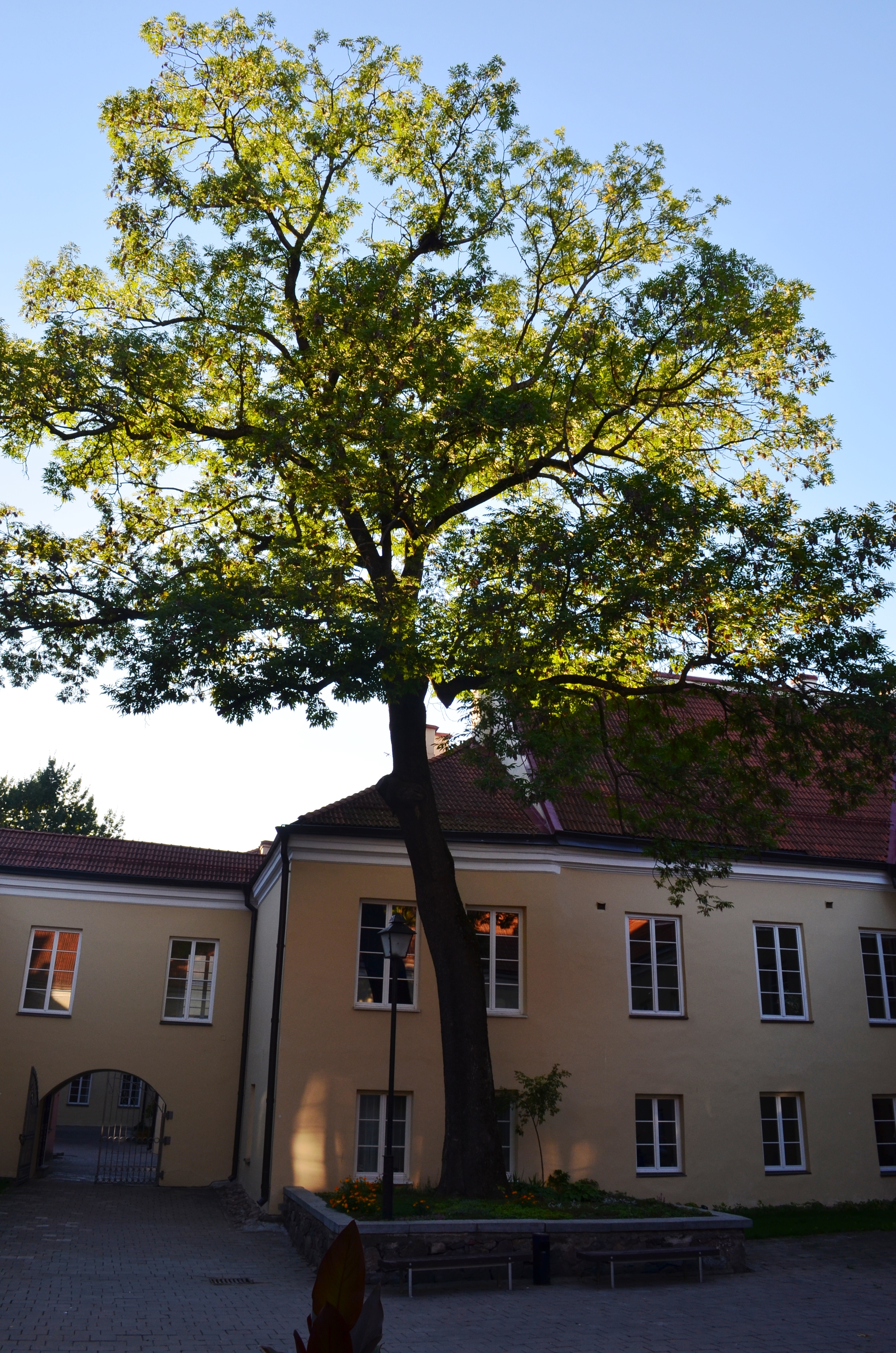 Saugomas uosis, VU A. Mickevičiaus kieme